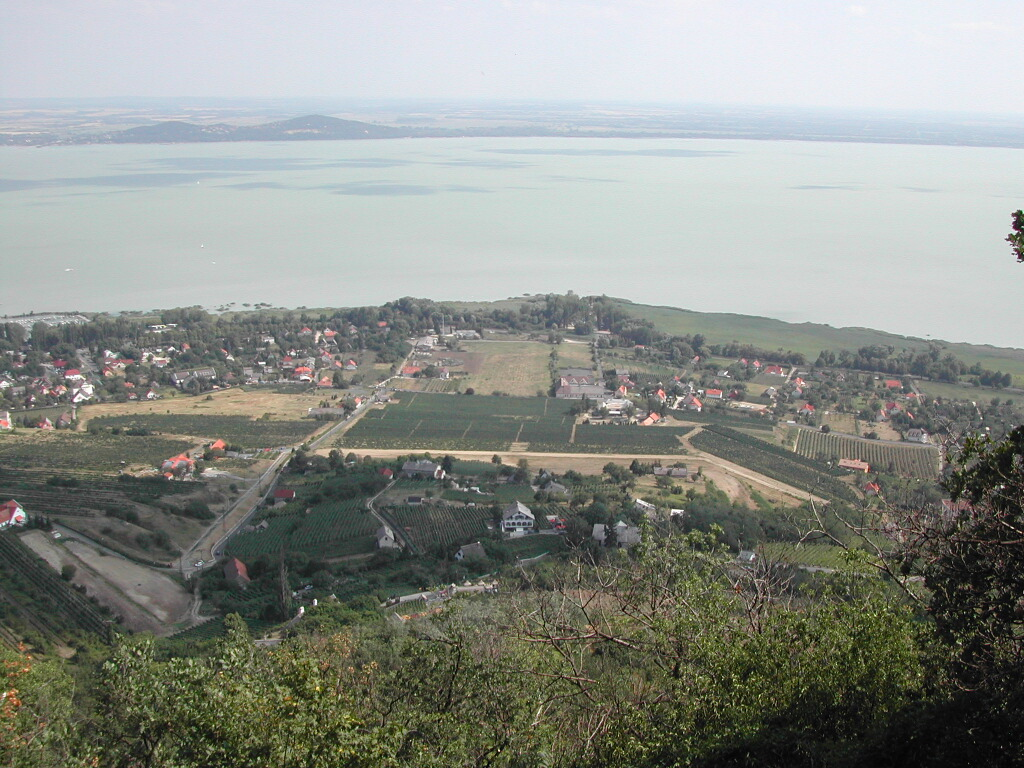 Badacsonytomaj, Badacsony, 8261 Hungary